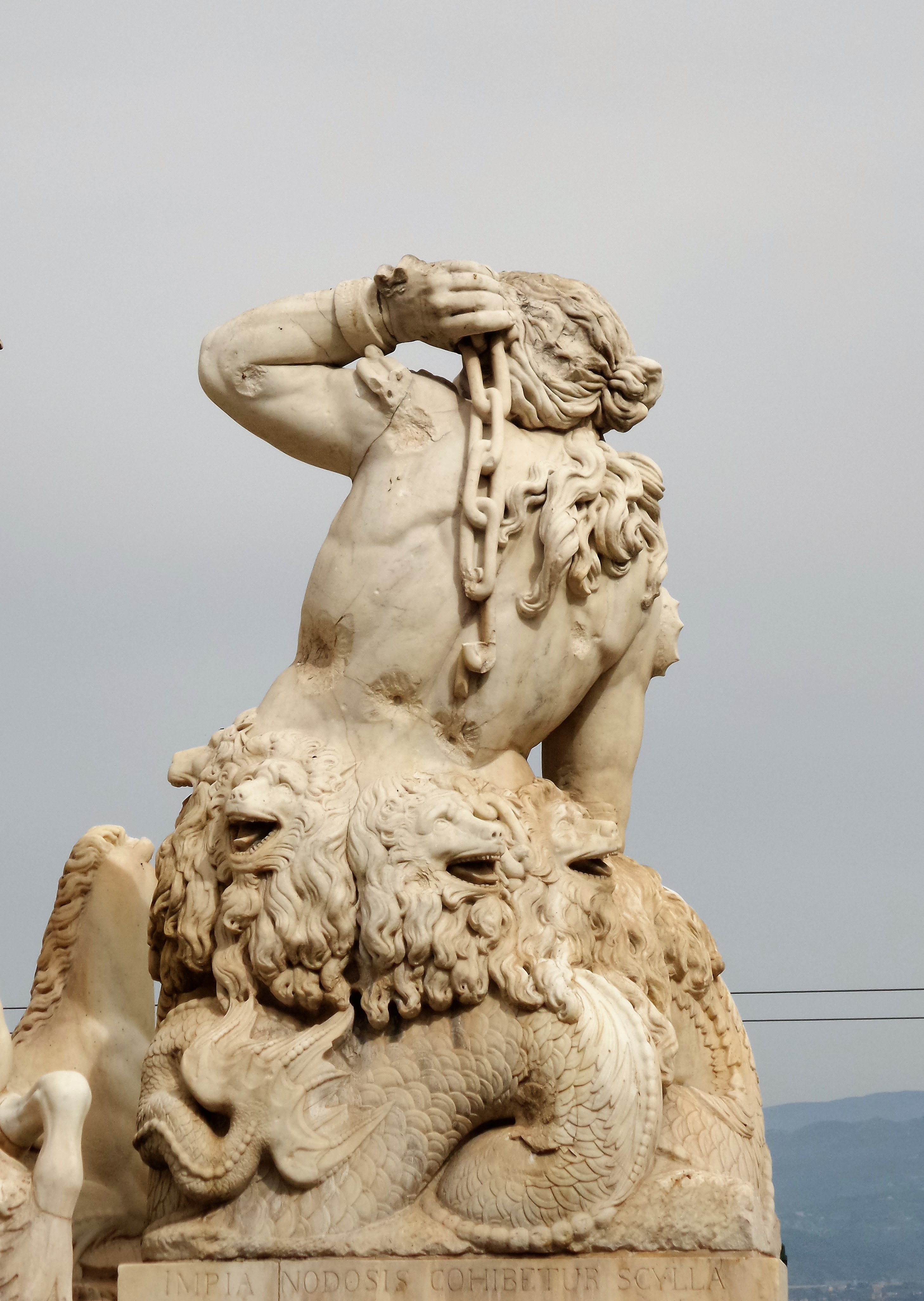 Neptunbrunnen (Messina), Scylla